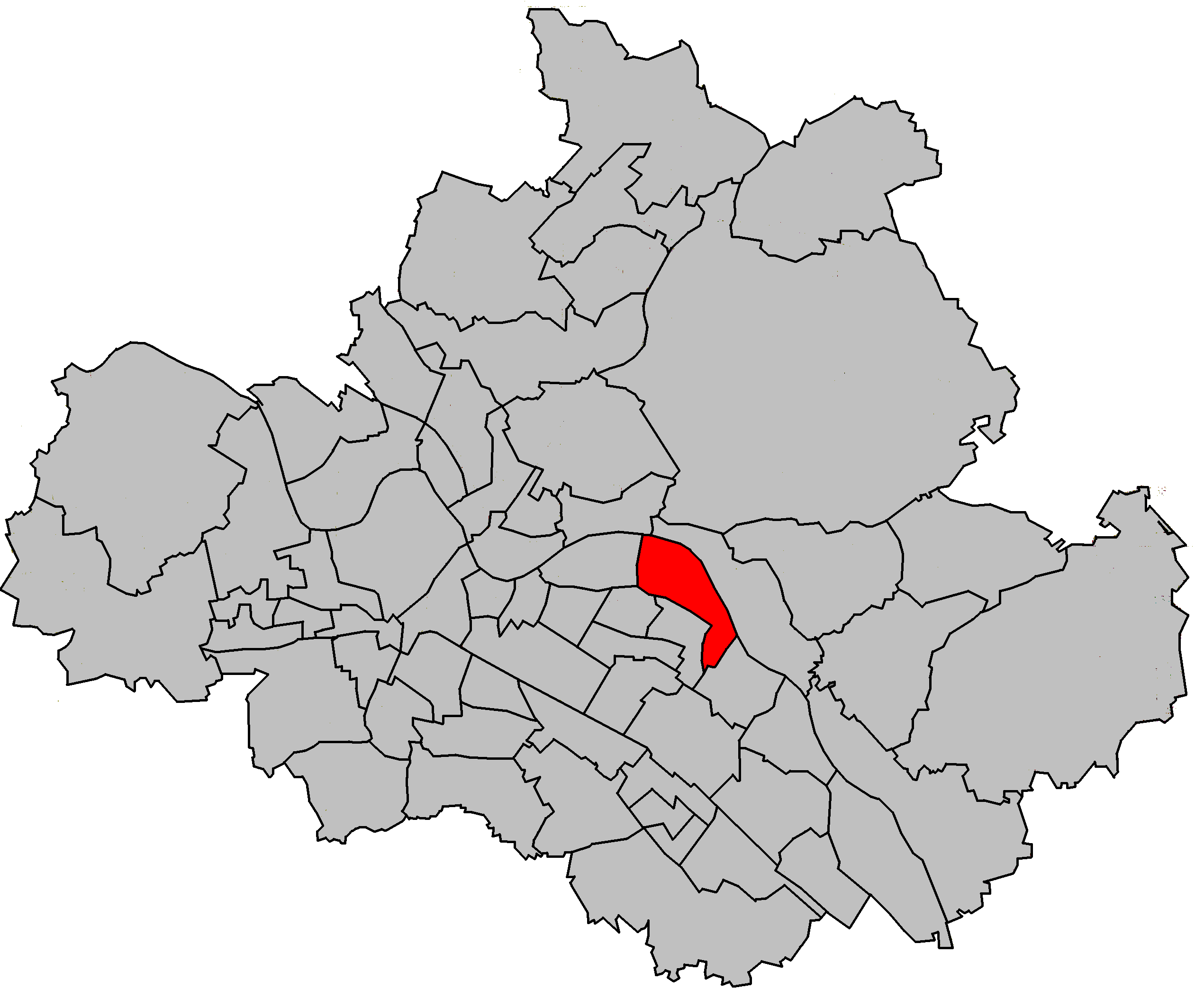 Dresdens statistischer Stadtteil Blasewitz